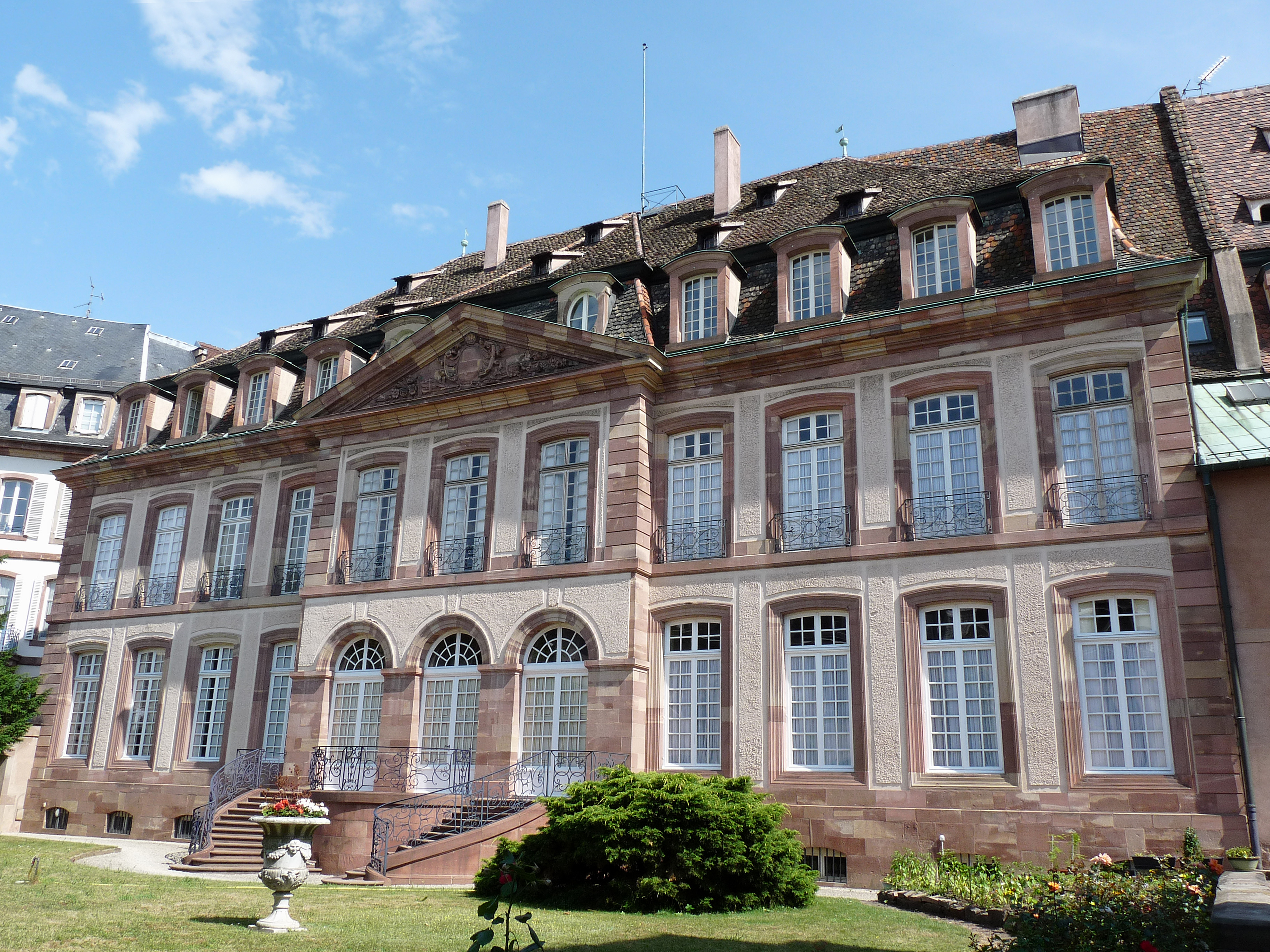 Strasbourg : façade du Palais épiscopal côté jardin (16, rue Brûlée)